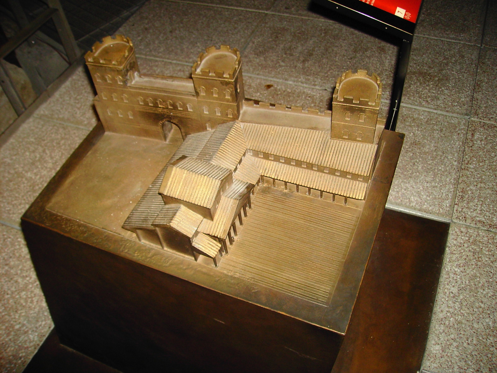 salle du baptistère (V siècle) au musée de l'ancien évéché - Grenoble